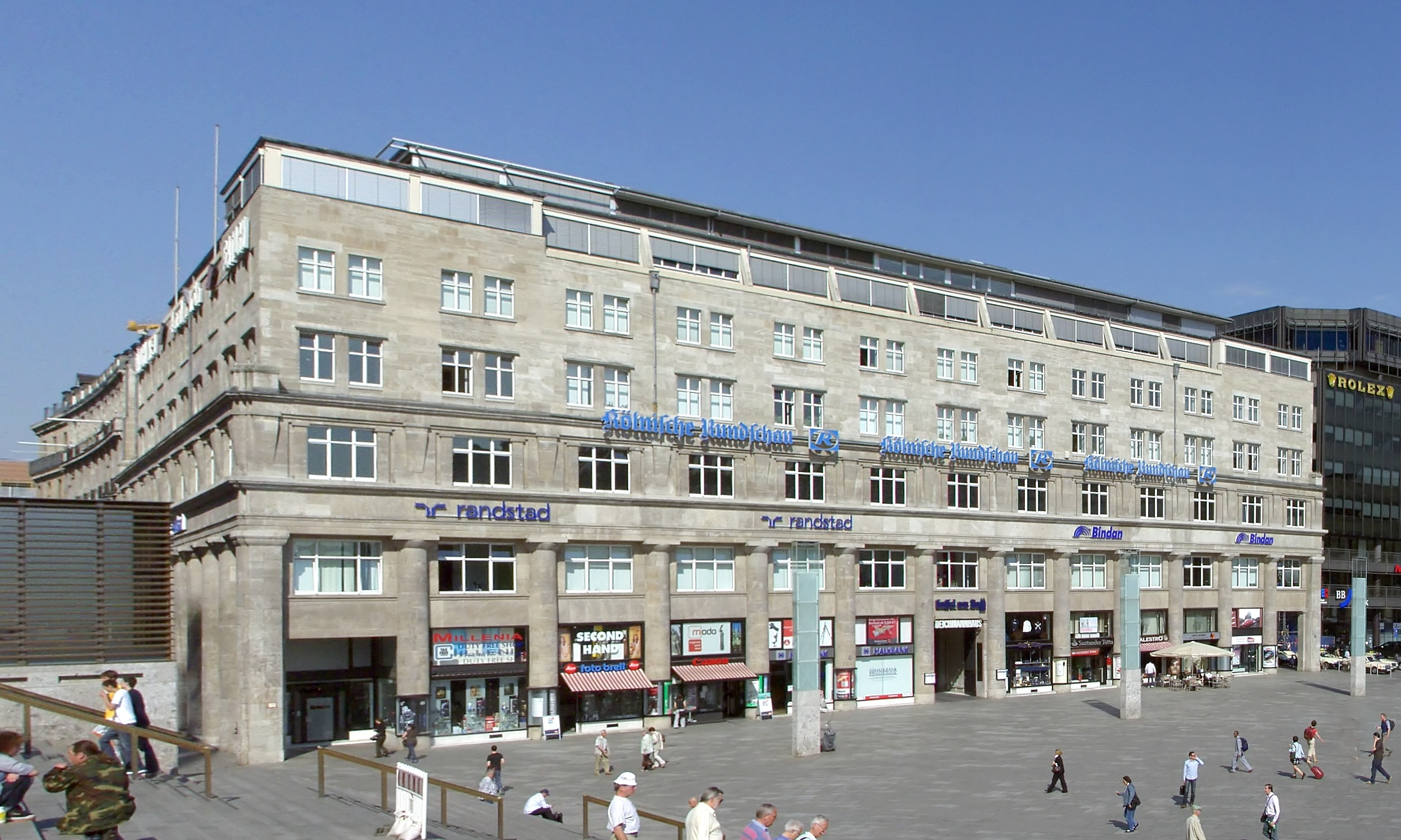 Deichmannhaus, Köln. Architekt: Heinrich Müller-Erkelenz This is a photograph of an architectural monument.